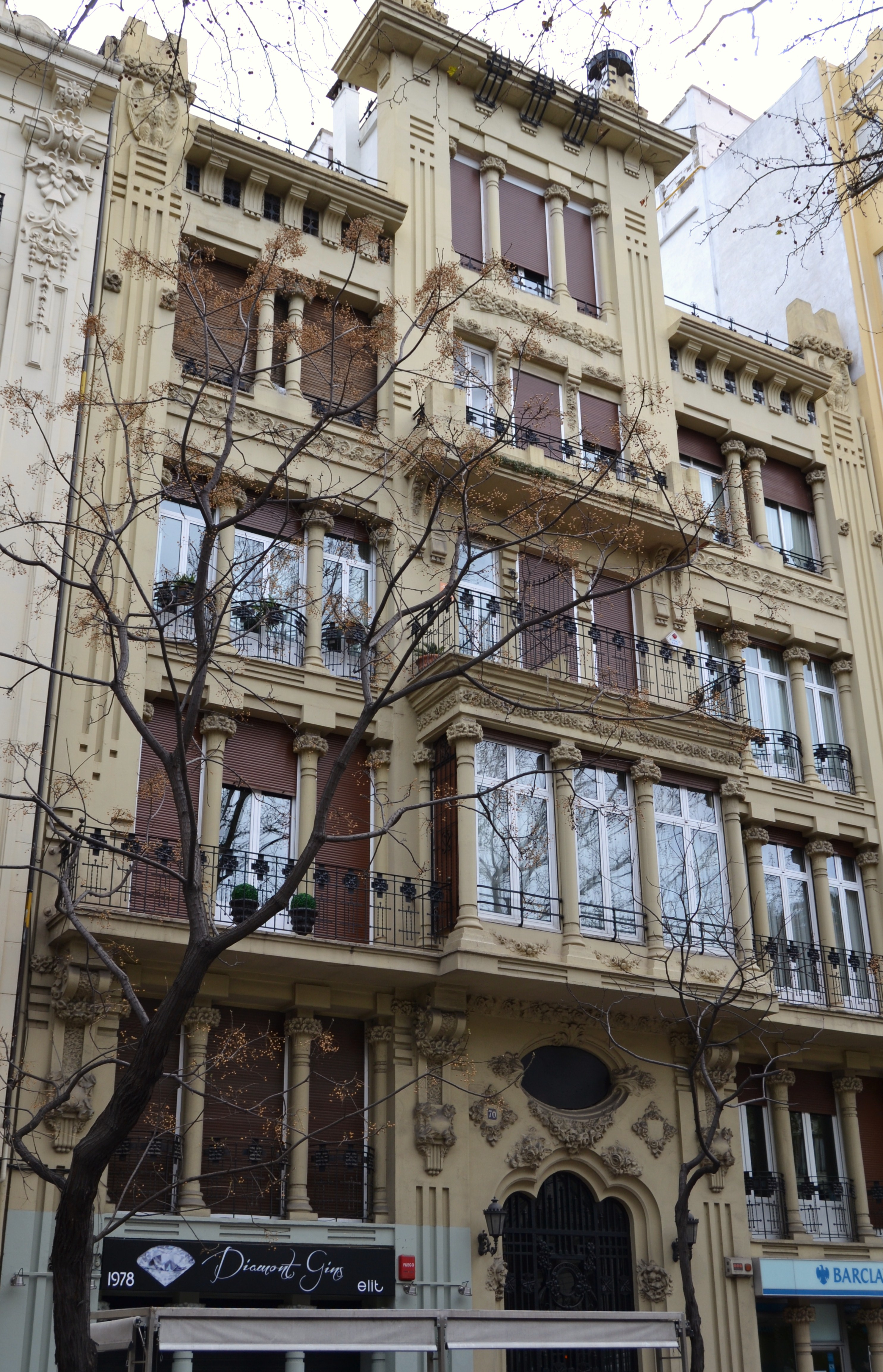 Casa Barona de València, és obra de l'arquitecte Javier Goerlich Lleó, any 1914. Està situada a la Gran Via del Marqués del Túria 70.